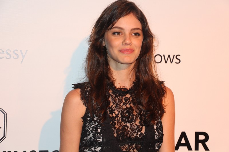 19 - Laura Neiva-001